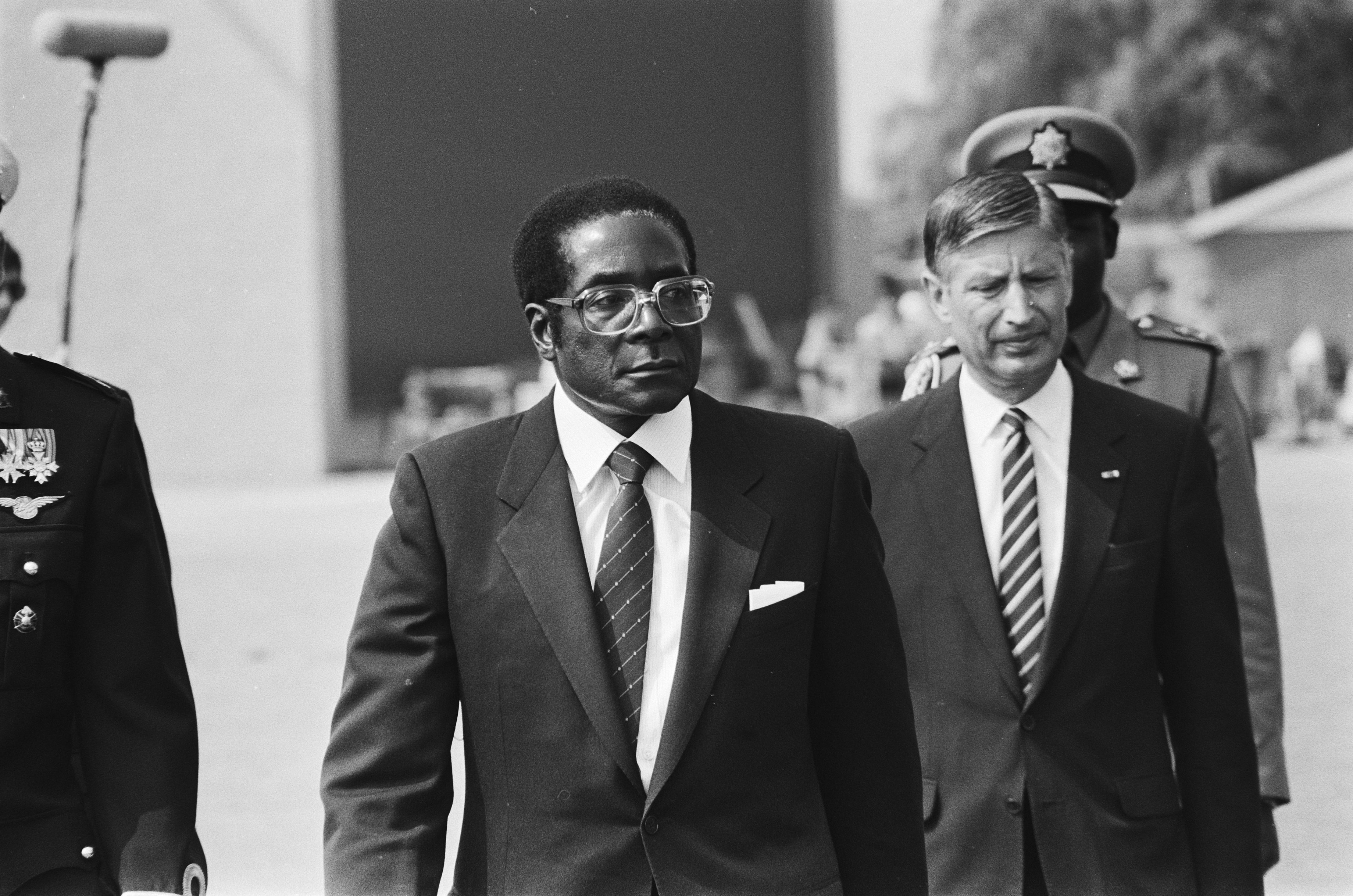 Collectie / Archief : Fotocollectie Anefo Reportage / Serie : [ onbekend ] Beschrijving : President Zimbabwe , Robert Mugabe bezoekt Nederland, premier Van Agt heet hem welkom Datum : 2 juni 1982 Locatie : Nederland Trefwoorden : premiers, presidenten Persoonsnaam : Agt, Dries van, Mugabe, Robert Fotograaf : Dijk, Hans van / Anefo Auteursrechthebbende : Nationaal Archief Materiaalsoort : Negatief (zwart/wit) Nummer archiefinventaris : bekijk toegang 2.24.01.05 Bestanddeelnummer : 932-1921